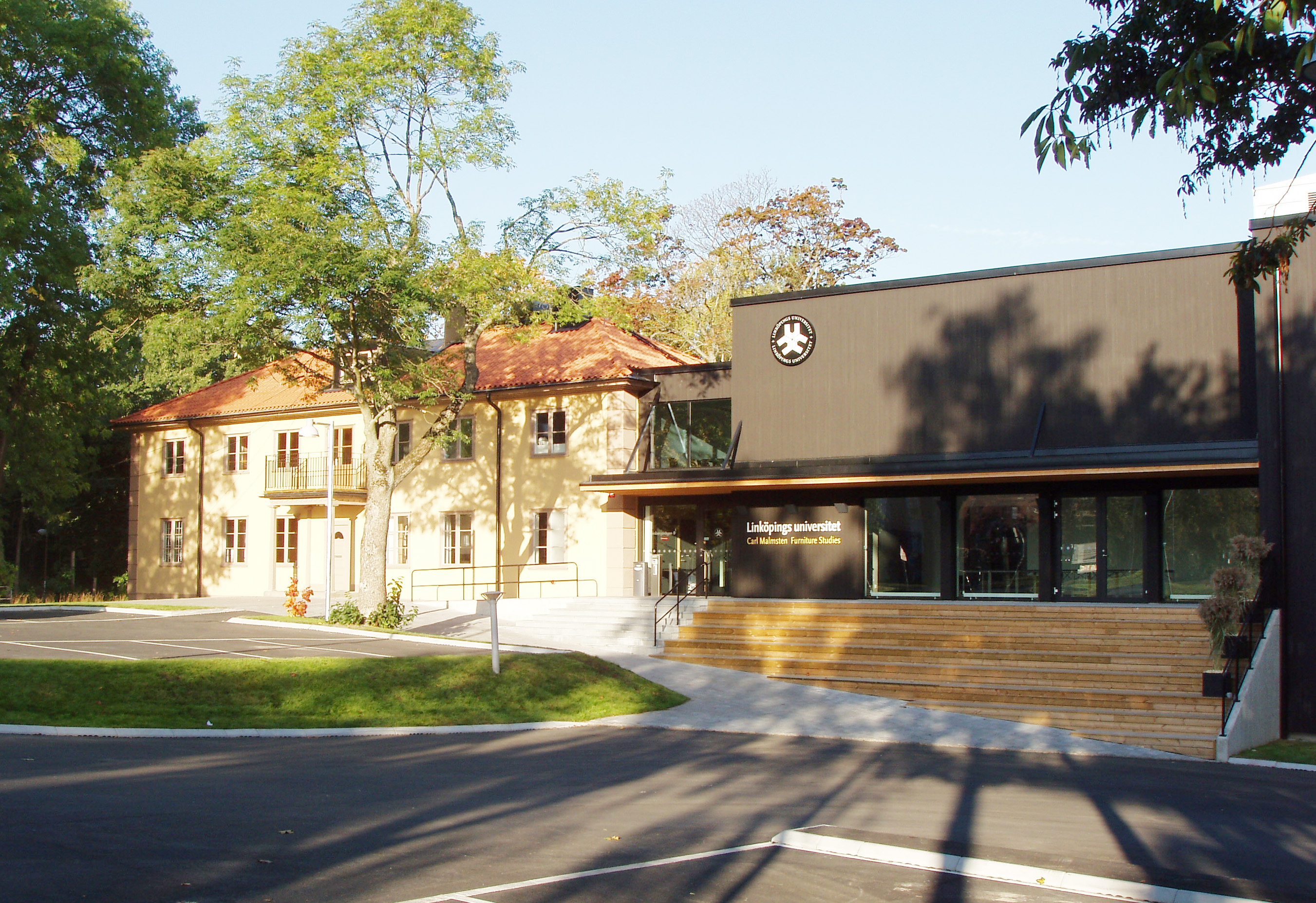 Carl Malmstens skolan-Furniture Studies på Lidingö, invigd 18 september 2009, ihopbyggd med Bodal gårds gamla herrgårdsbyggnad.